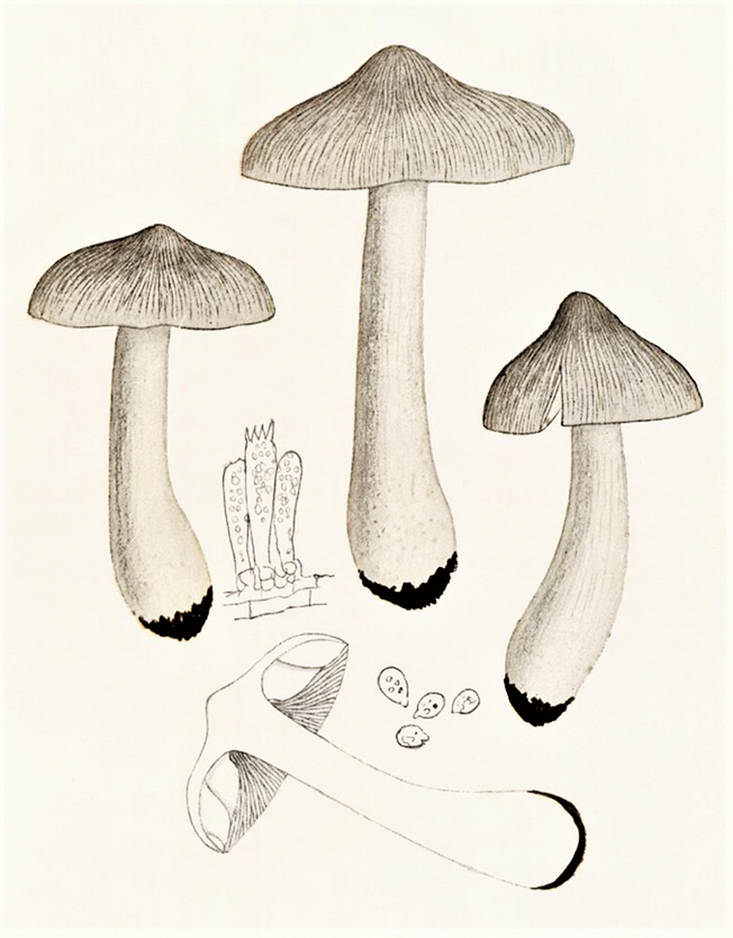 Giacomo Bresadola: Tricholoma virgatum (Fr., 1818) P.Kumm. (1871)